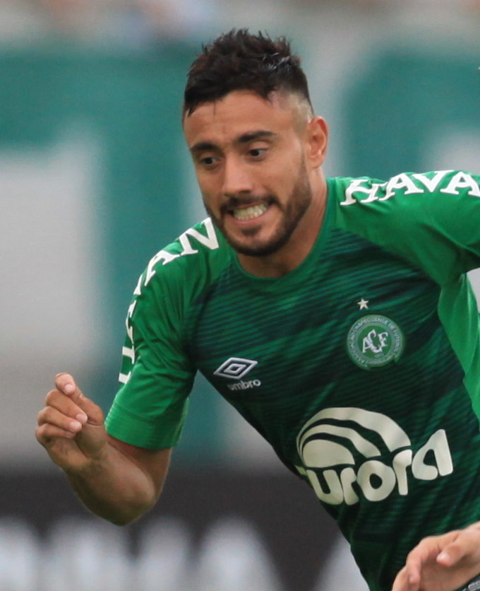 Alan Ruschel pela Chapecoense